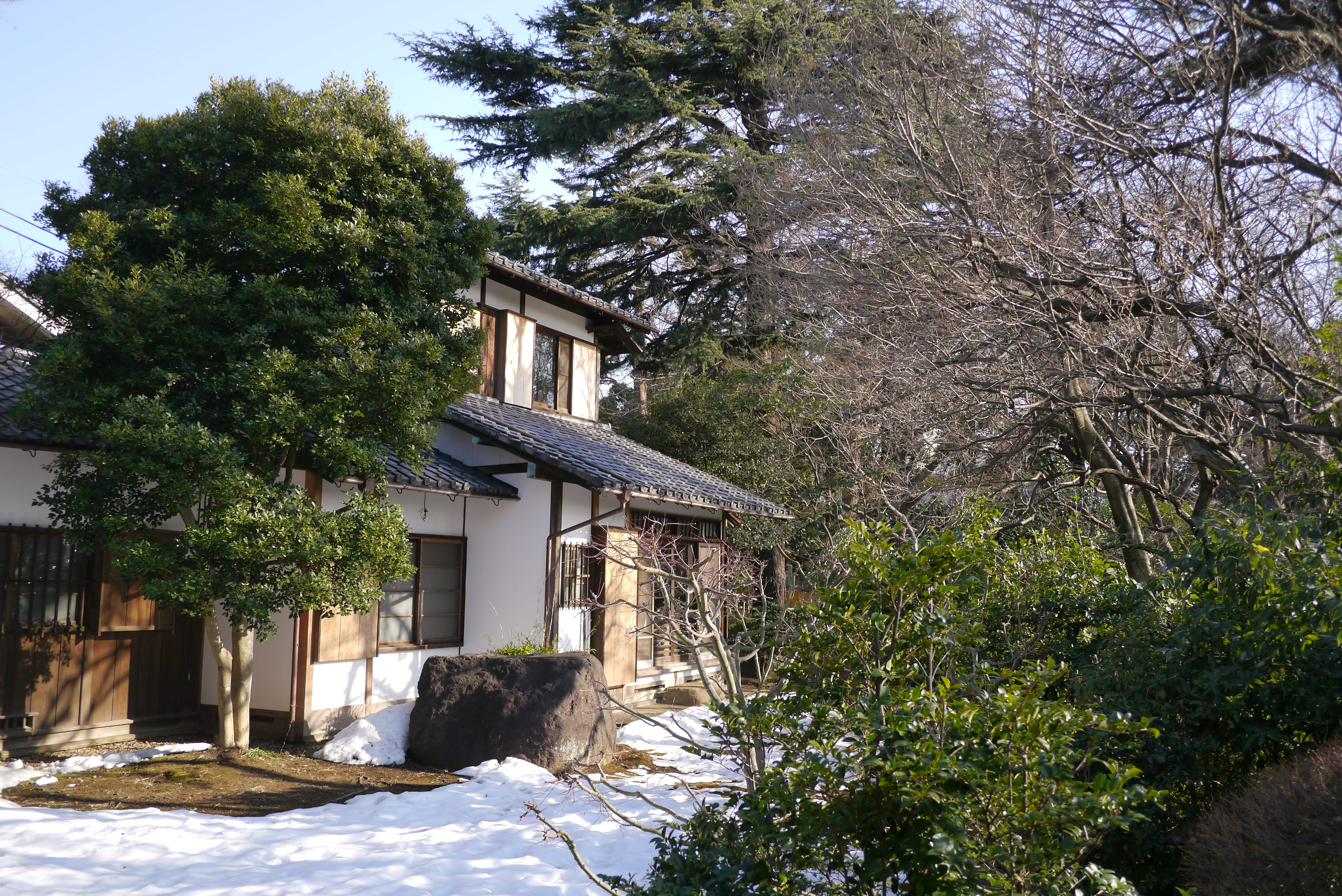 旧小坂邸中庭